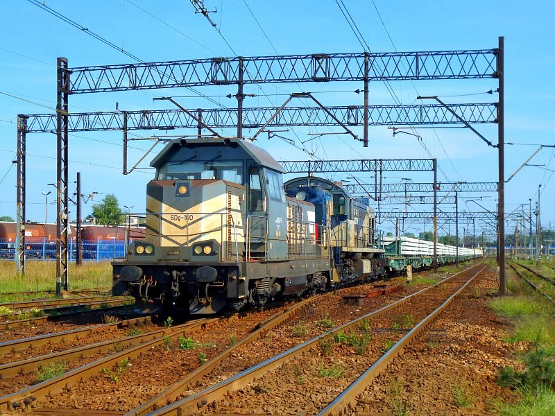 Zmodernizowany spalinowóz 6Dg-100 należący do przedsiębiorstwa Grupa Azoty Koltar na czele pociągu towarowego w Trzebini.